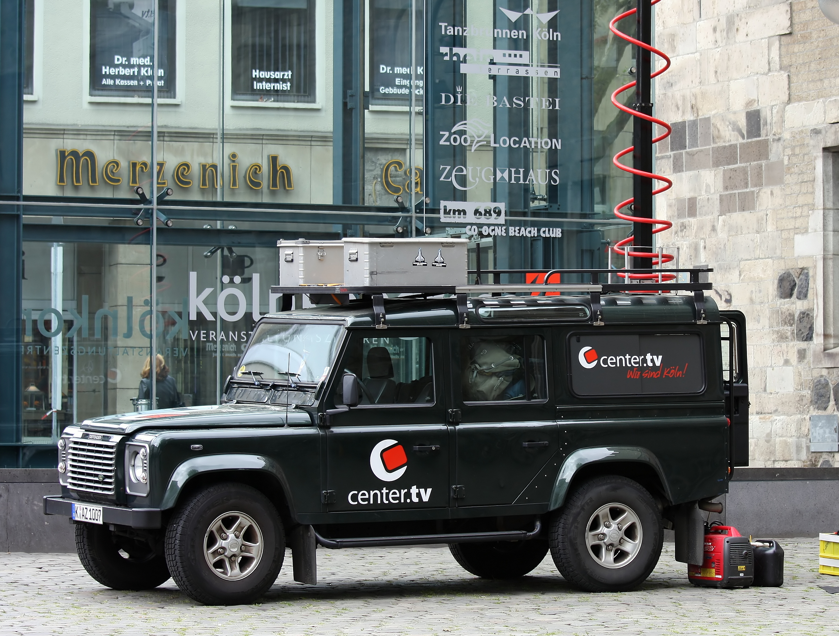 Ein Land Rover Defender als Übertragungswagen von center.tv Köln vor dem Gürzenich Köln